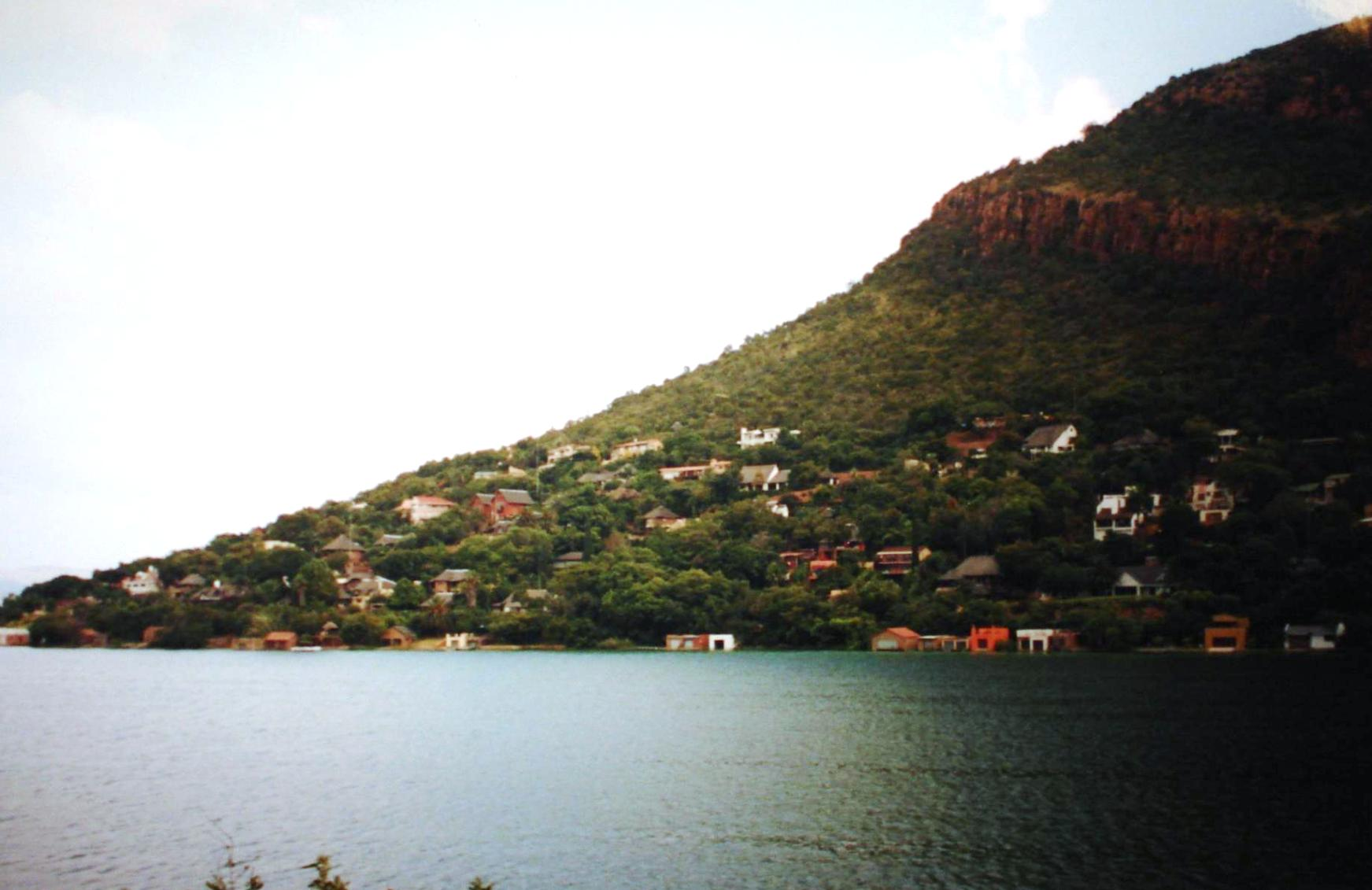 Der Stausee am Hartbeespoort-Damm (RSA - Gauteng)